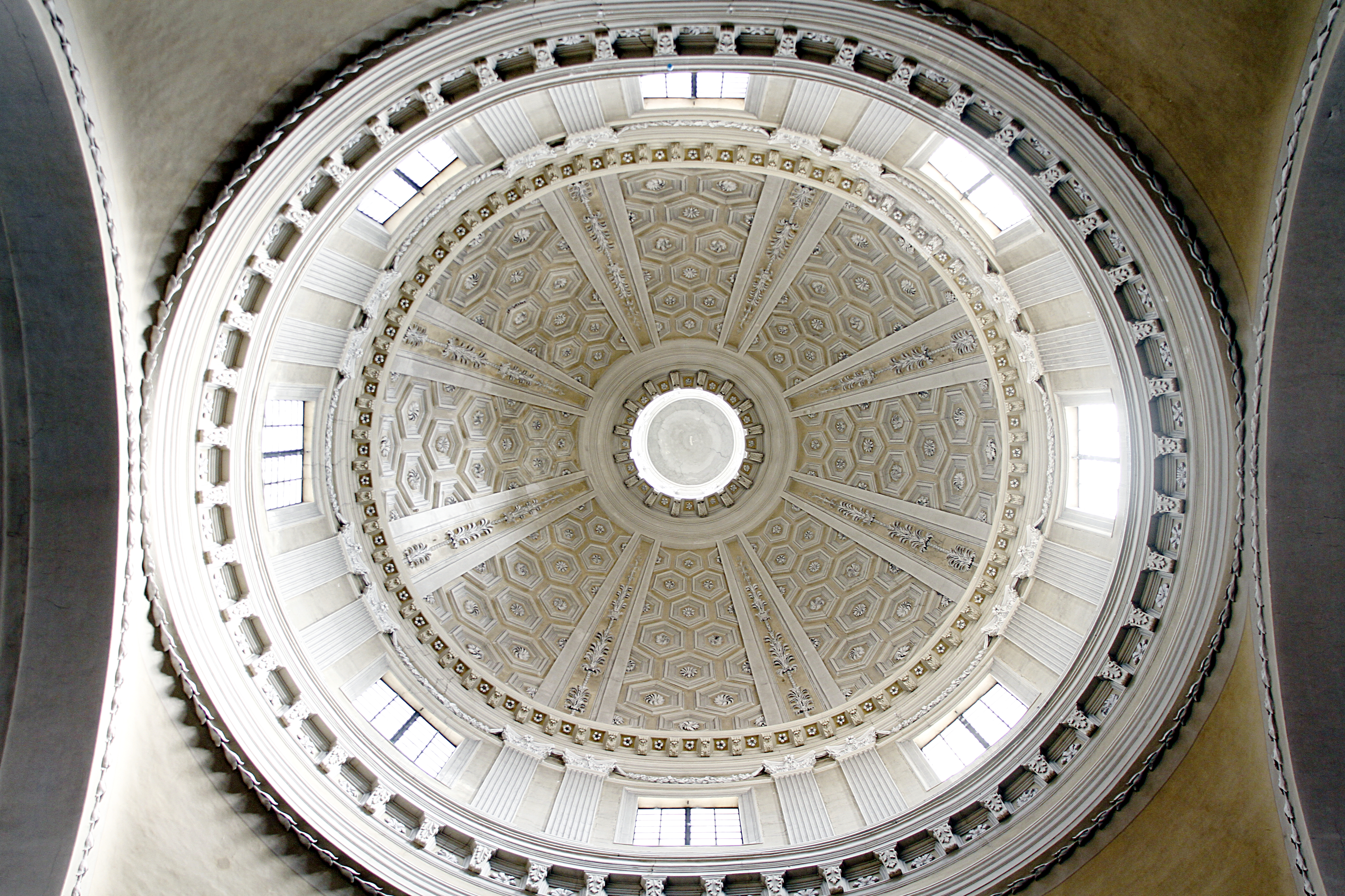 Duomo - Ravenna